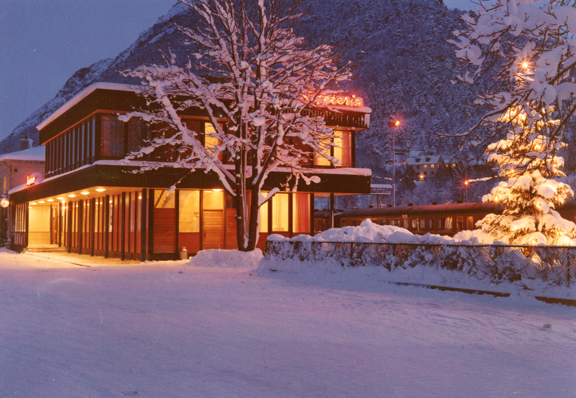 Da er fem luker åpnet i vår julekalender. ÅNDALSNES STASJON I VINTERSKRUD Bildet er hentet fra arkivet etter Norsk Spisevognselskap. Årstall ukjent. I arkivet finnes ca. 150 fotografier fra perioden 1919-1974. Norsk Spisevognselskap drev flere jernbanerestauranter. Den første jernbanerestauranten ble åpnet på Østbanestasjonen i Oslo i 1919. I 1924 overtok Spisevognselskapet ytterligere syv restauranter; Kornsjø, Halden, Ski, Eidsvoll, Otta, Dombås og Åndalsnes. Arkivreferanse: Pa1528_ua2_010 WINTER WONDERLAND AT ÅNDALSNES STATION The photo is from the archive of Norsk Spisevognselskap. Year unknown. In the archive there are about 150 photos from the period 1919-1974. Norsk Spisevognselskap ran several railway restaurants. The first one was opened in Oslo in 1919. In 1924, the company took over another seven restaurants: Kornsjø, Halden, Ski, Eidsvoll, Otta, Dombås and Åndalsnes.